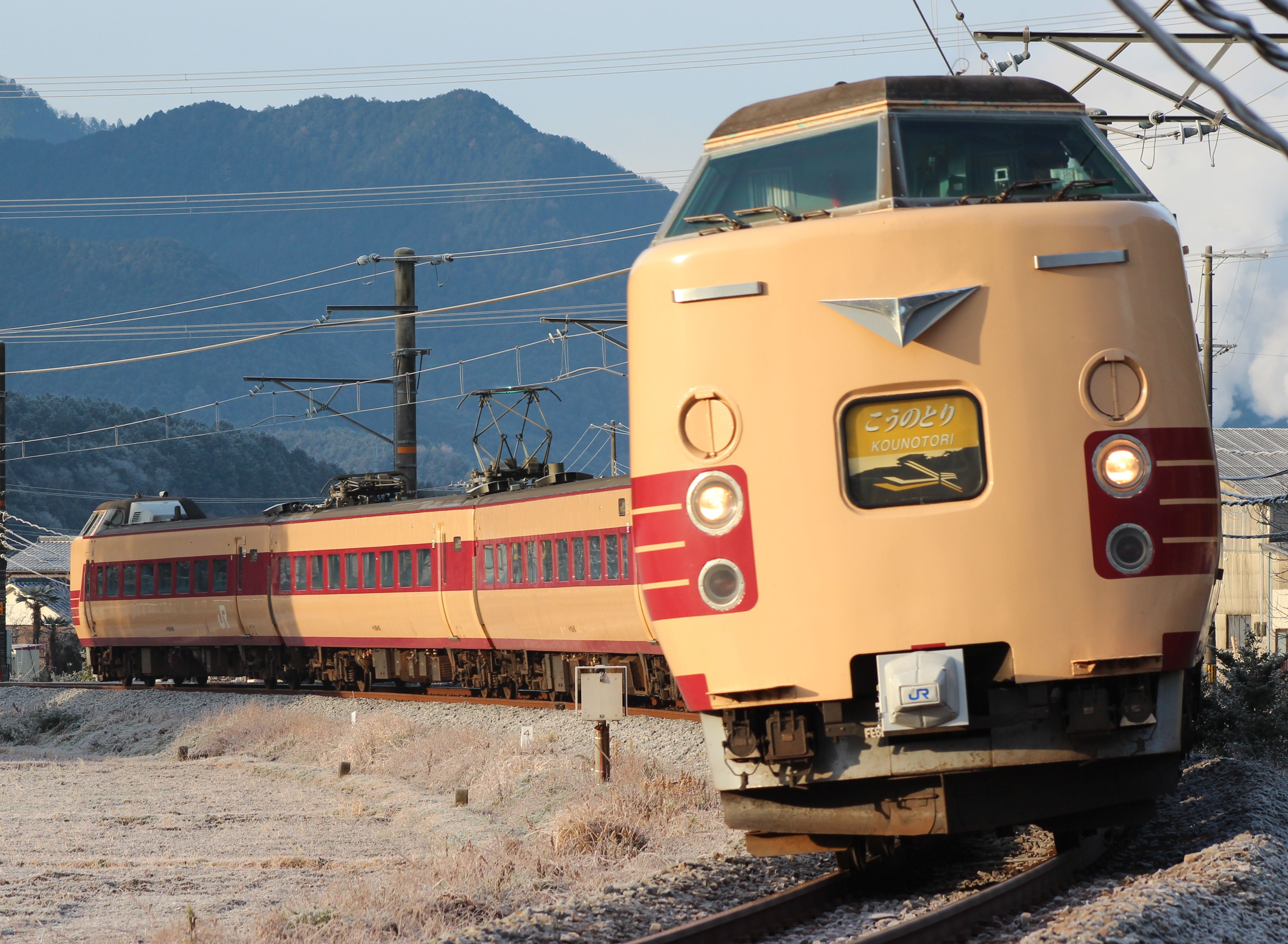 JR西日本381系電車